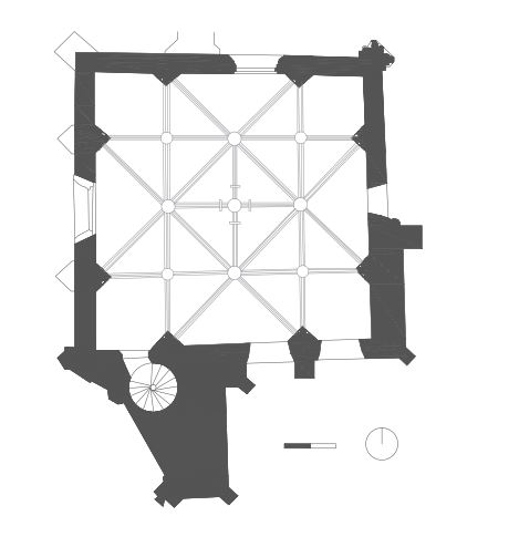 pôdorys